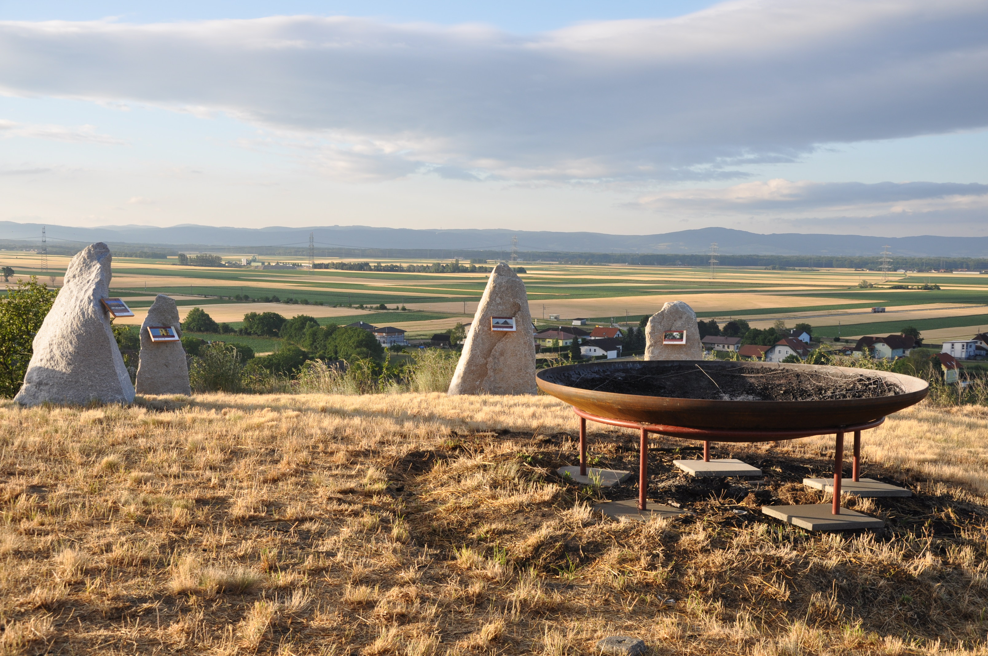 Der Leeberg Pettendorf in der Marktgemeinde Hausleiten im Bezirk Korneuburg Teil des Erlebnisweges "Kultur verbindet". Blick von der neu gestalteten Kuppe ins Umland.